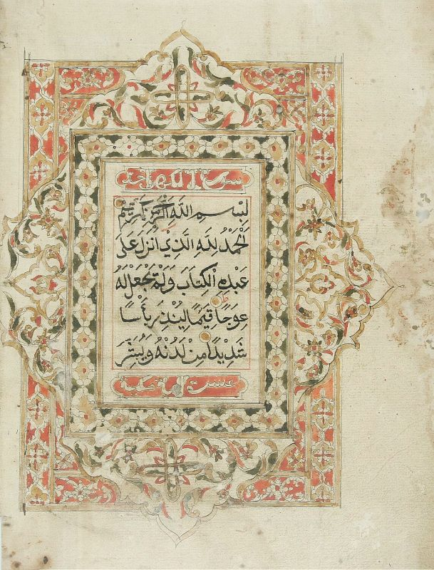 Folio. Pagina uit een koran. De tekst is een deel van een hoofdstuk uit de Koran (18:1-2) en betreft een waarschuwing voor de christenen. De tekst loopt door op een volgende pagina die zich eveneens in de collectie van het Tropenmuseum bevindt (687-62).. Pagina uit een koran Unknown language: Jus teungoh